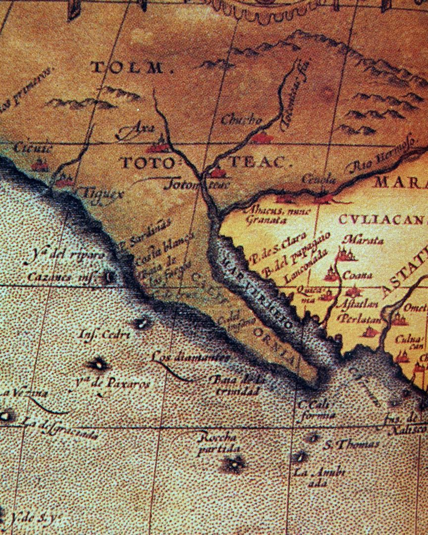 Mapa de 1586 de California